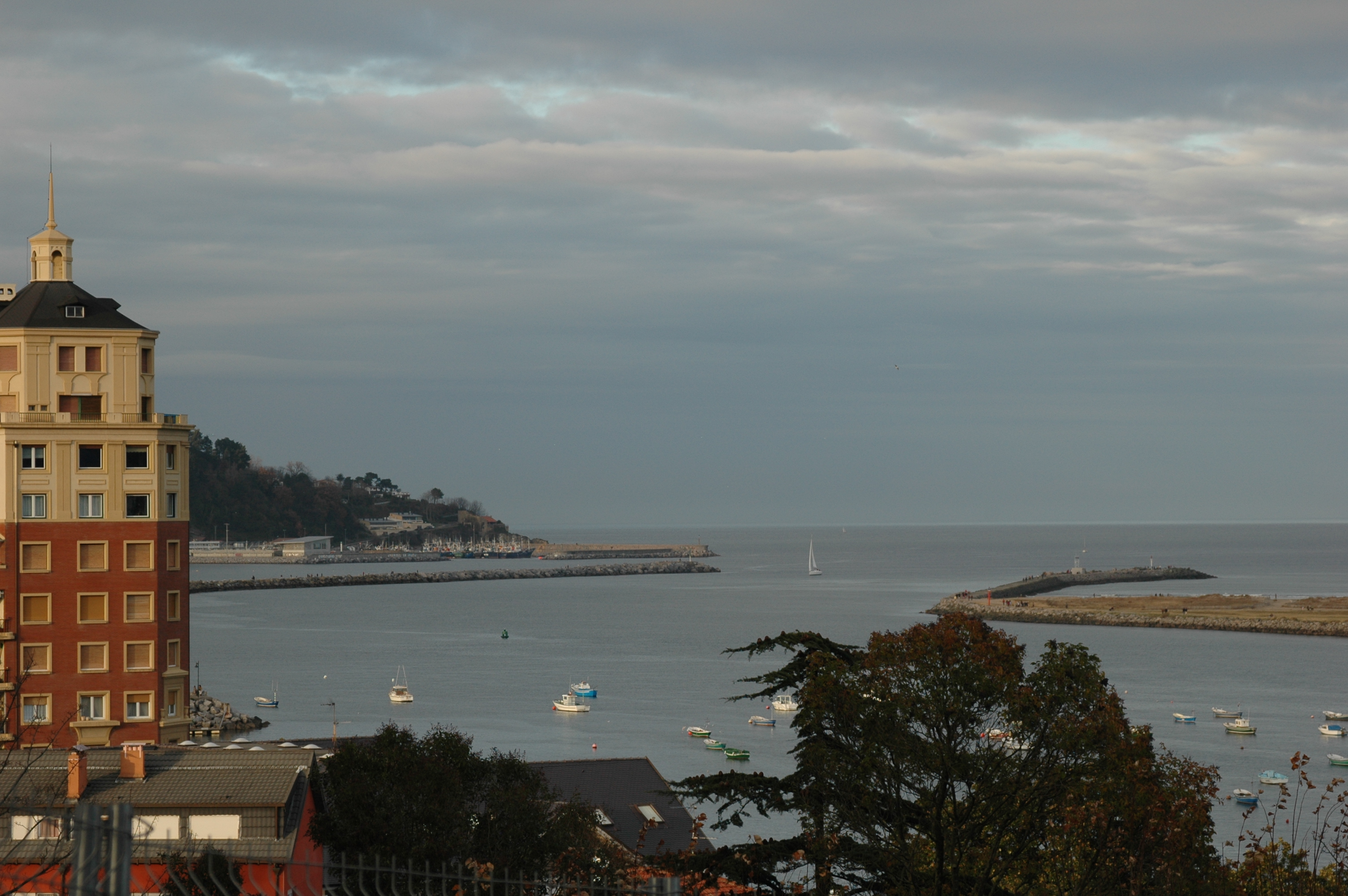 Fontarrabie, vue sur l'estuaire de la Bidassoa. Photo prise le 06/01/07 par Harrieta171